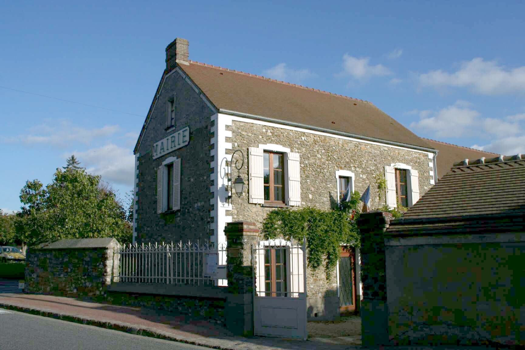 Mairie de Richebourg - Yvelines (France)